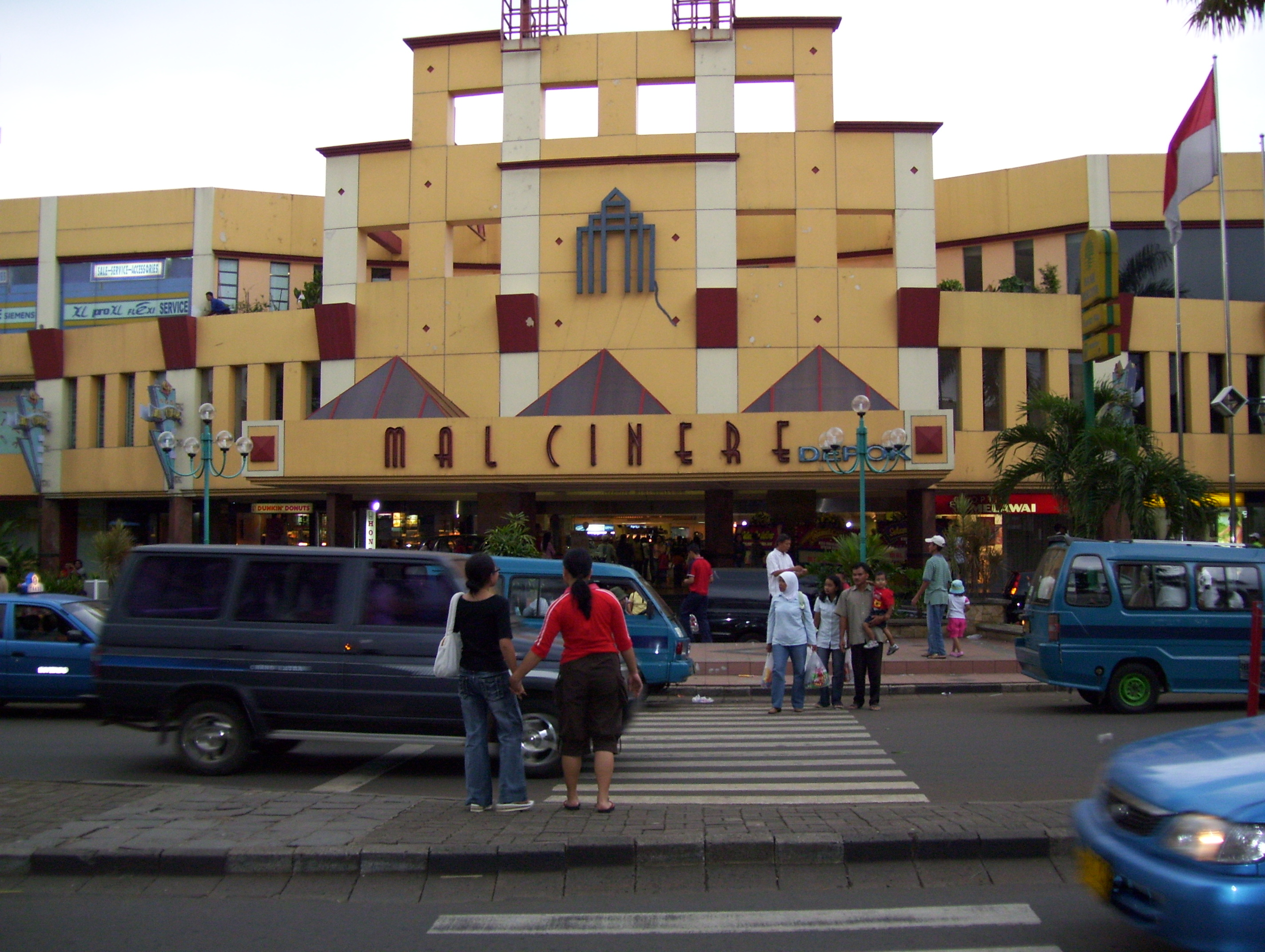 Mal Cinere, Jakarta